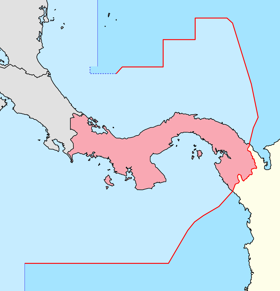 Frontière Colombie-Panama